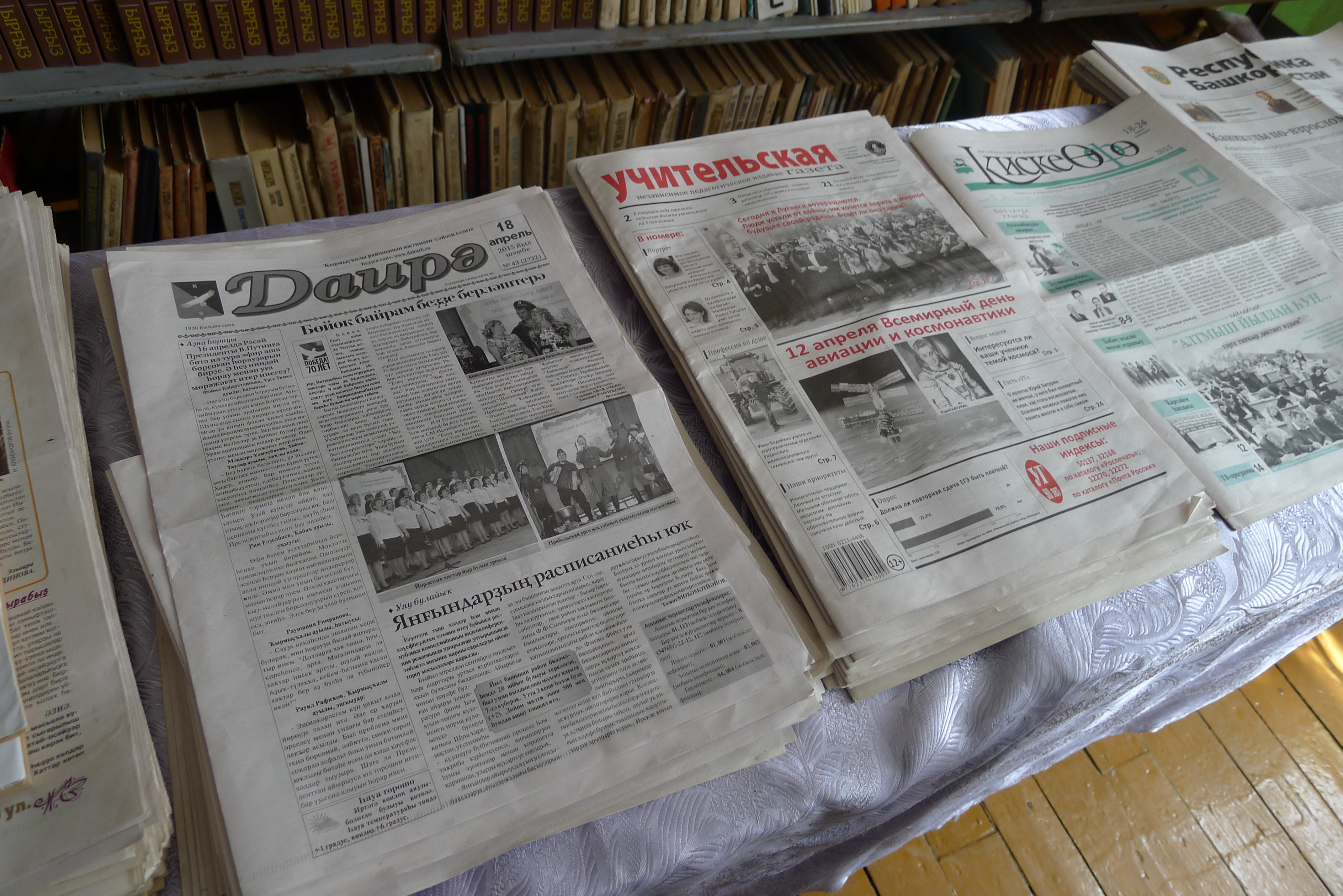 Поездка викимедистов Рустама Нурыева (Уфа), Амира Ахарони (Иерусалим) и Николая Павлова (Якутск) в деревню Старобабичево